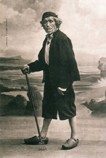 Goémonier de Kerlouan vers 1920